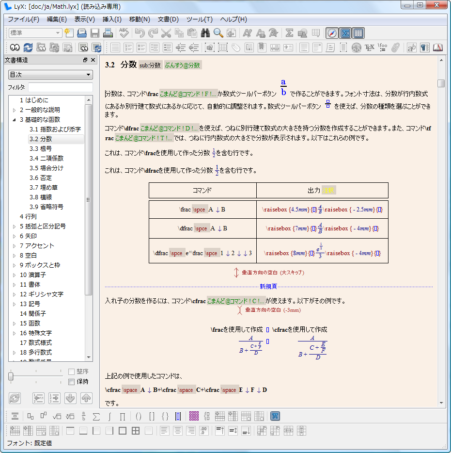 Lyx2.04日本語表示のキャプチャ。表示文章はLyxヘルプの「数式」の項目。